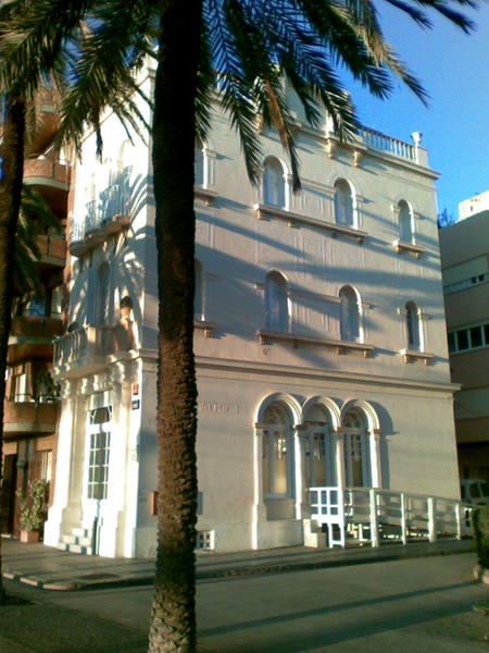 Escola del Mar, a la Rambla de Badalona (Centre)